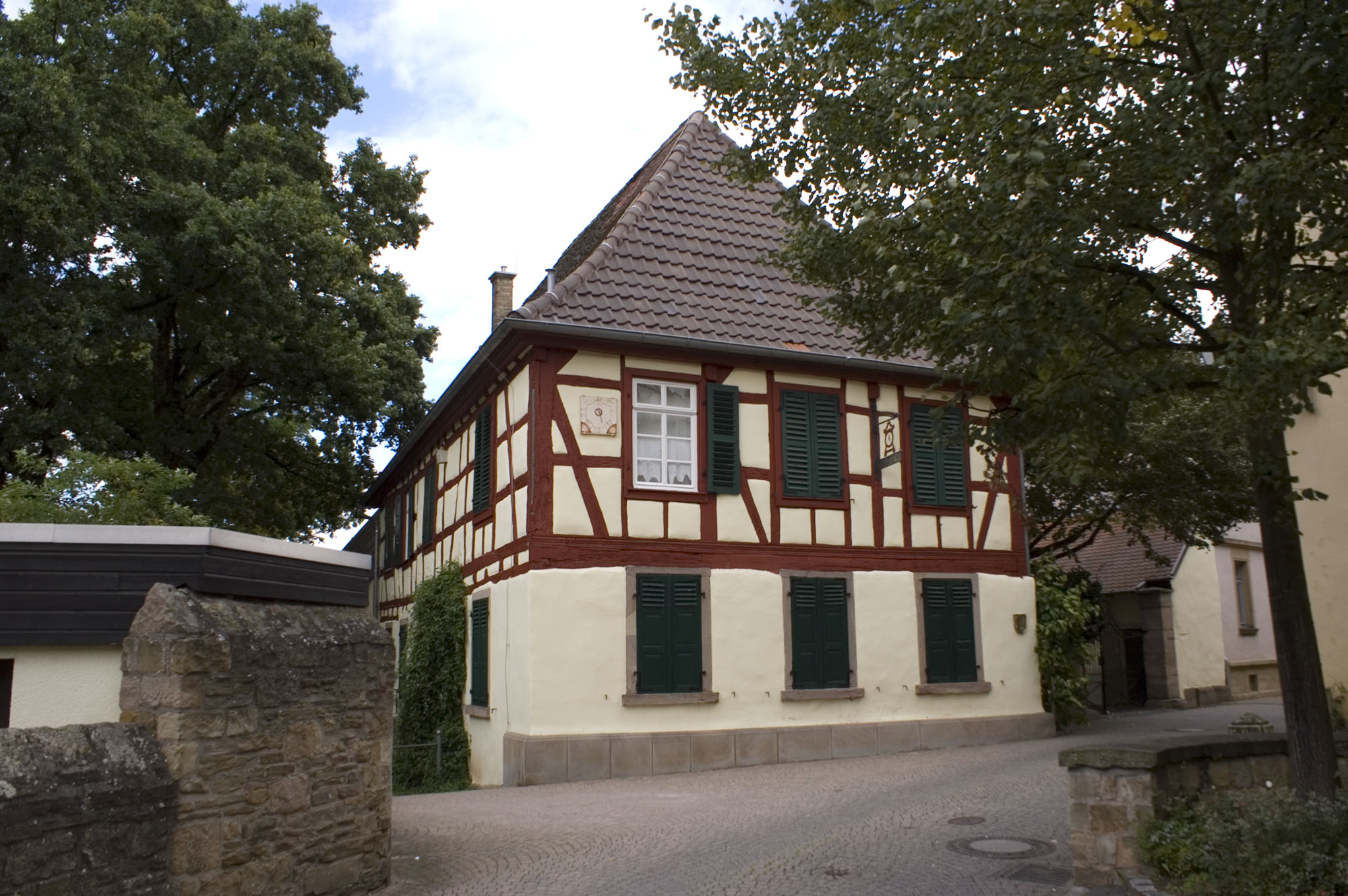 Schloßstraße 10: ehemalige Wohnhaus, heute Uhrenstube und Pfälzisches Turmuhrenmuseum; teilweise Fachwerk, 18. Jahrhundert, bezeichnet 1825 (wohl Umbau), ehemalige Scheune